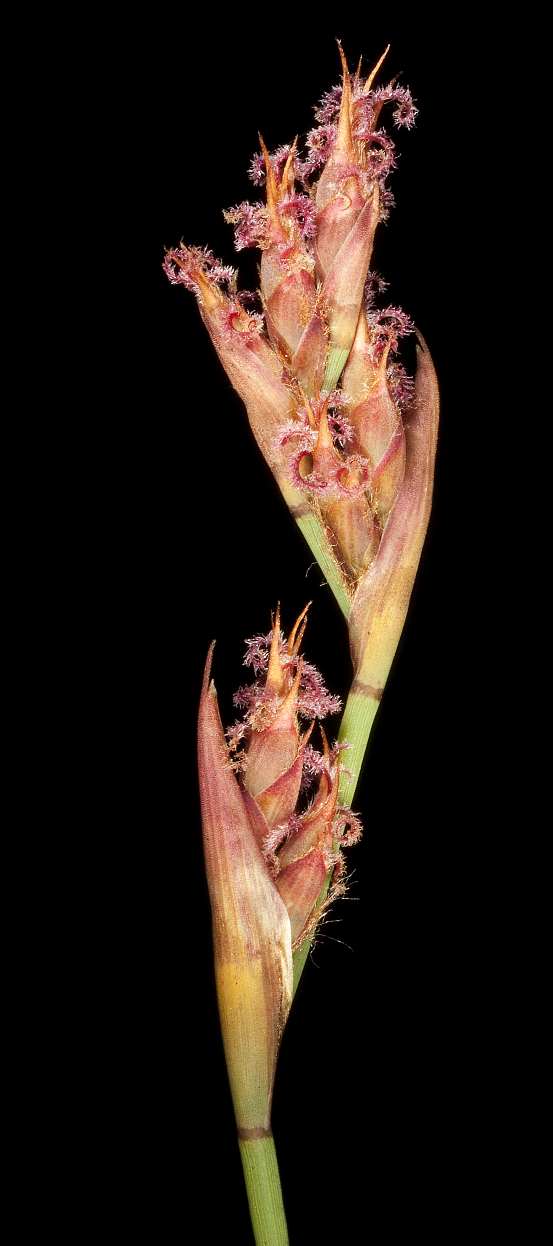 KRT4791